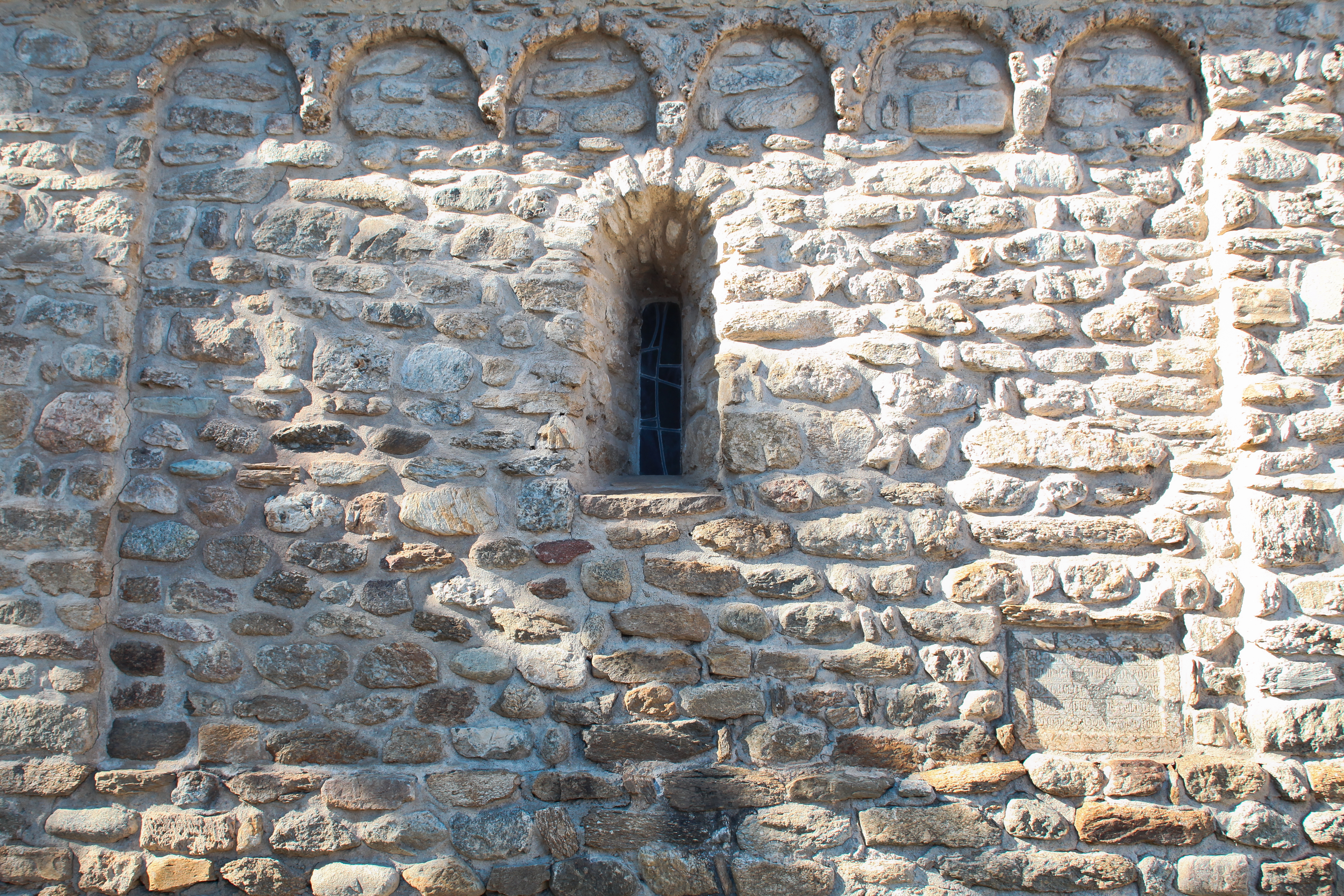 Église Sainte-Eulalie de Fuilla (Classé) .